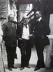 Autore sconosciuto, foto primi 'novecento. Da sinistra: Gaetano Koch, Pio Piacentini, Manfredo Manfredi